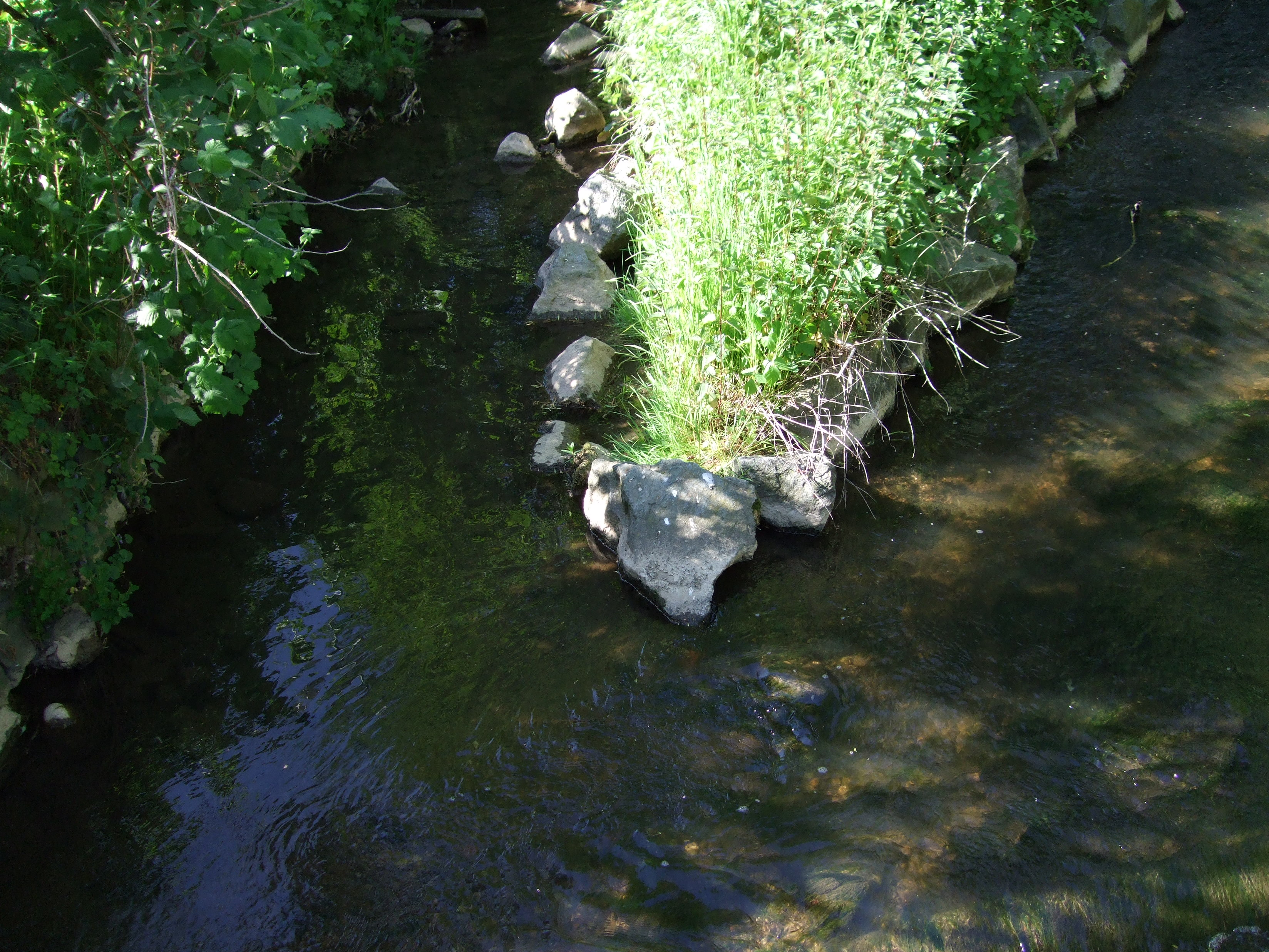 Zusammenfluss des Waldbaches und des Sauerbornsbaches zum Schwalbach